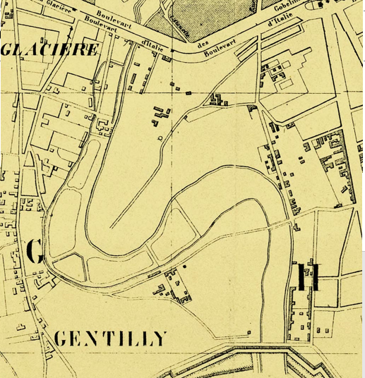 Plan de Paris 1858 (Petit Gentilly)